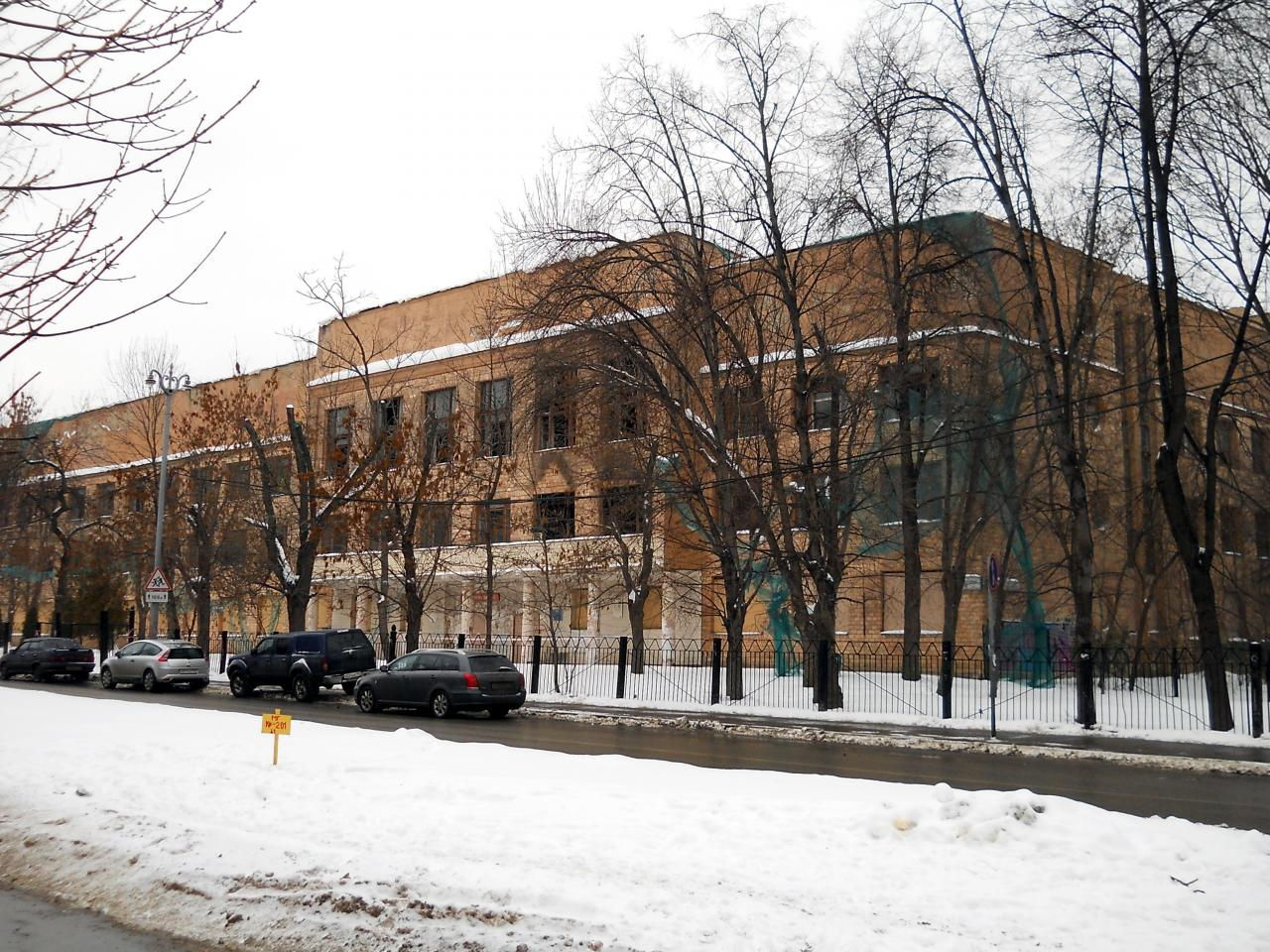 Гимназия № 201 имени Зои и Александра Космодемьянских до реконструкции